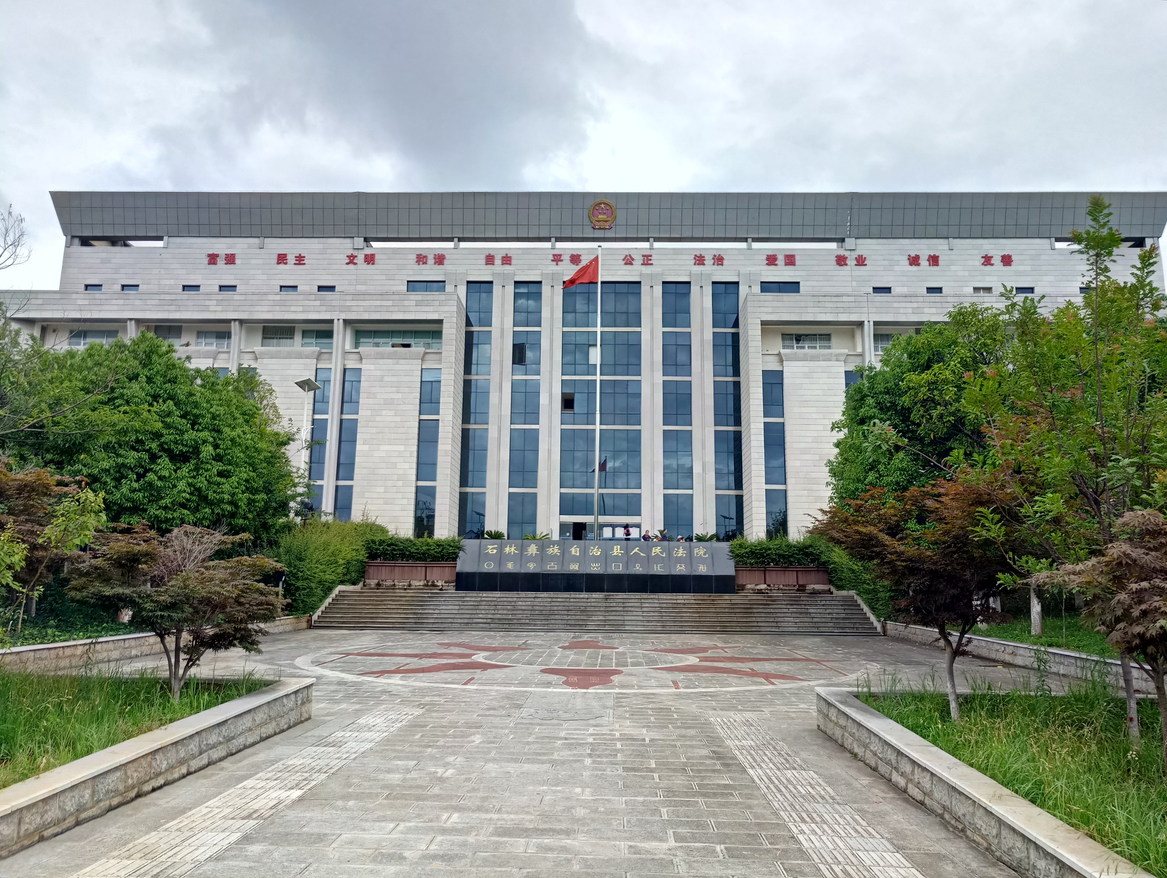 中文（中国大陆）: 石林彝族自治县人民法院